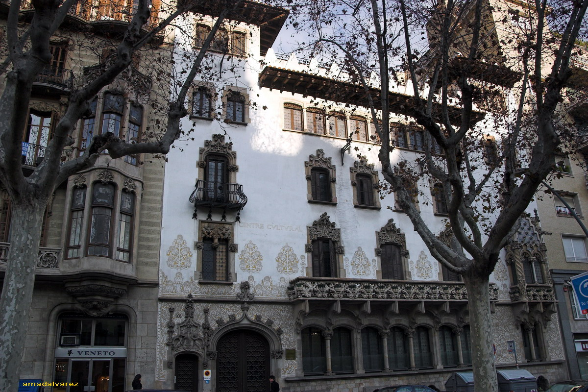 Palau Macaya (Barcelona-Catalunya), obra de Josep Puig i Cadafalch 1901. Psg. Sant Joan, 108.